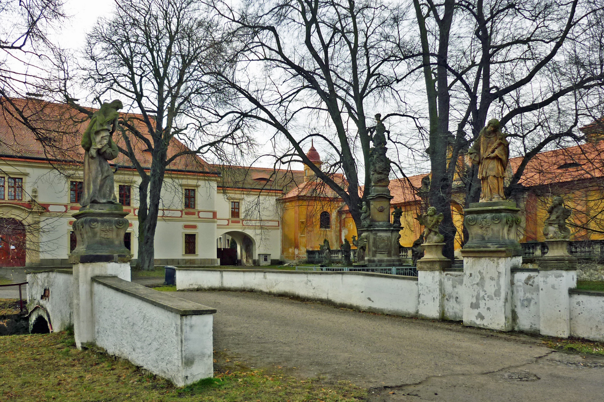 Statue des hl. Johannes von Nepomuk und des hl. Felix von Cantalice (links) an der Wallfahrtskirche Maria Ratschitz von Johann Adam Dietz